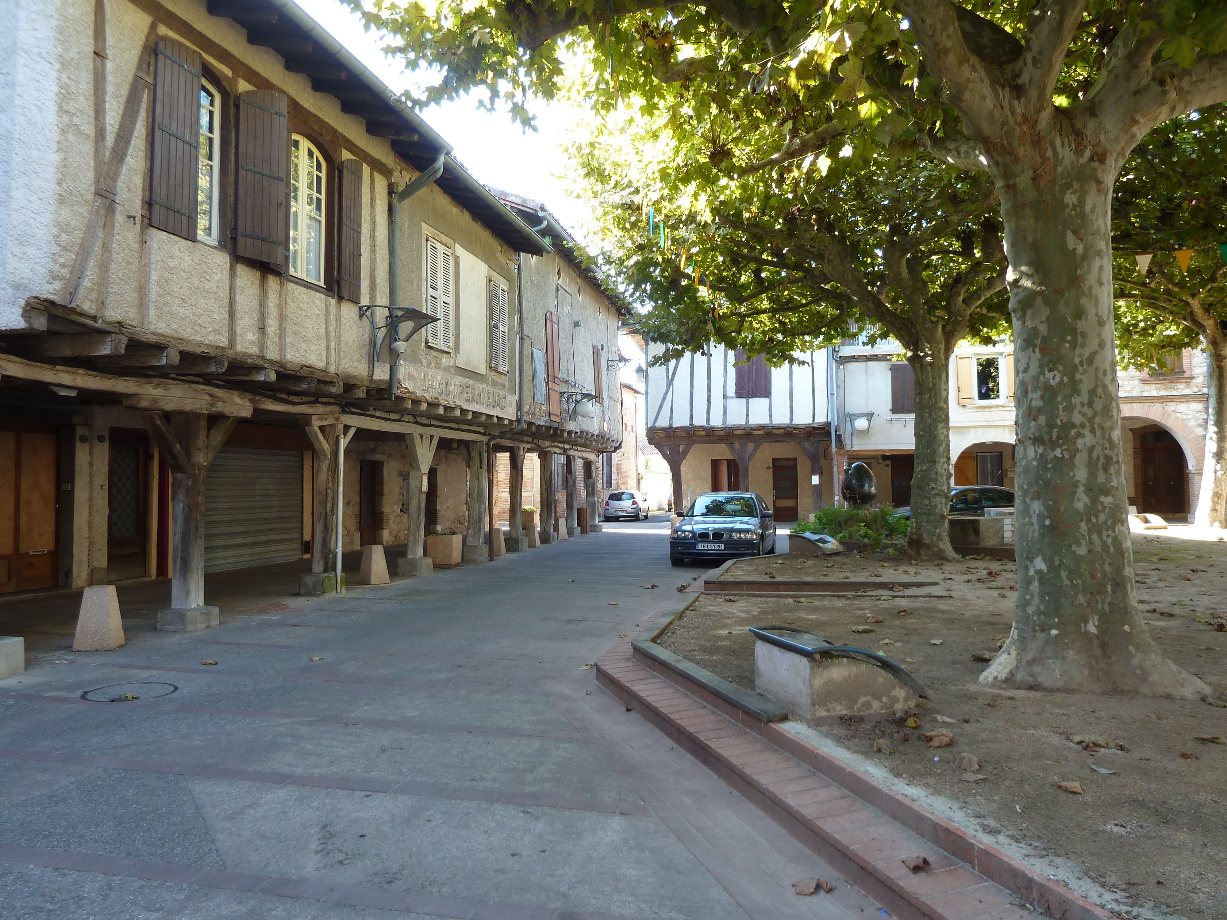 Briatexte (Tarn) - Place à couverts